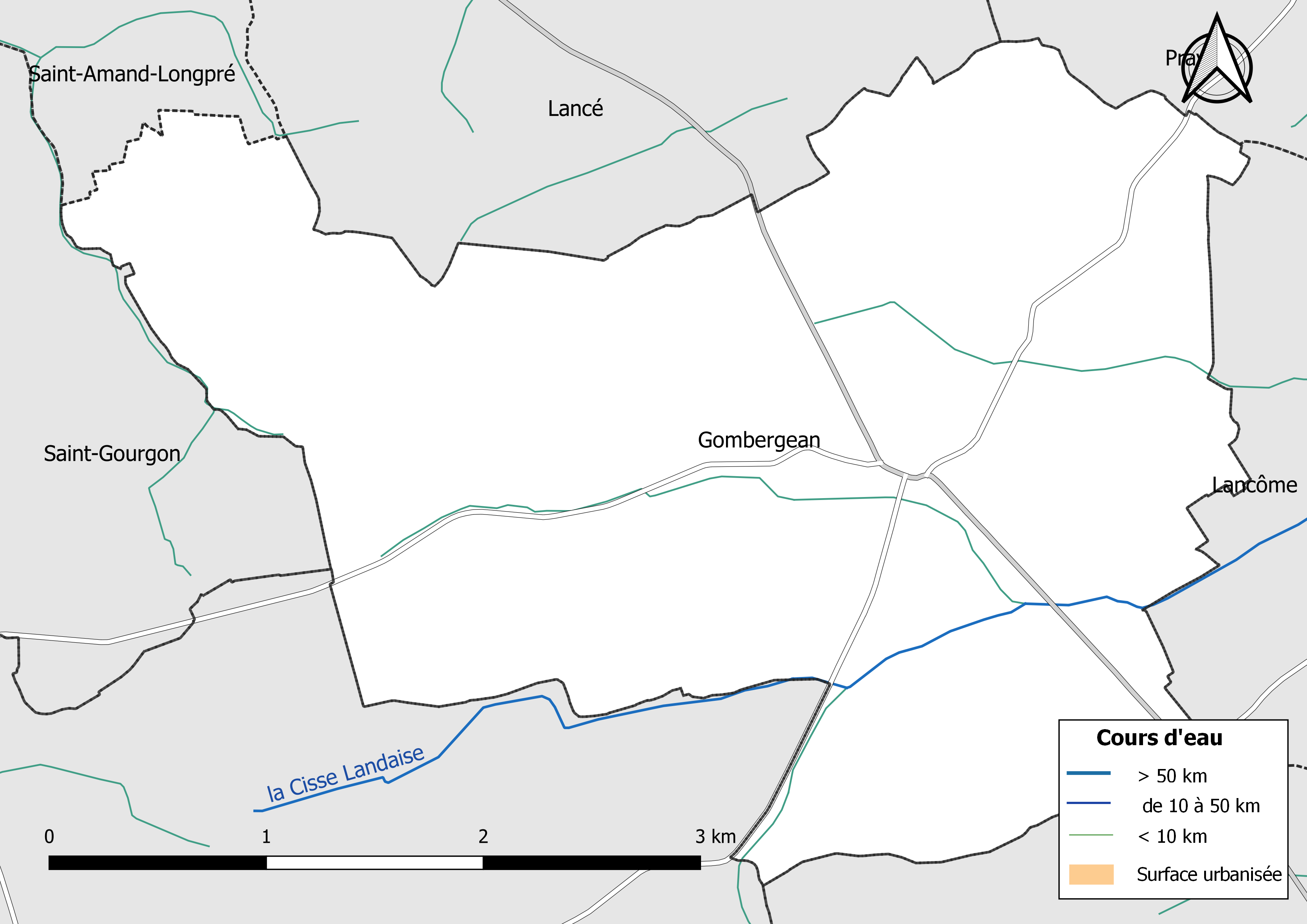 Carte du réseau hydrographique de la commune de Gombergean (France).